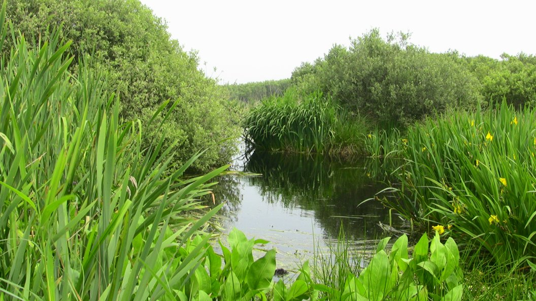 Zwanenwater